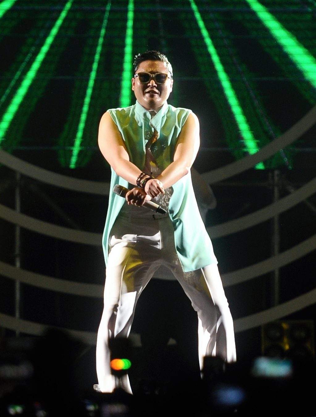 SEPANG,17/03/2013. PSY duirng Future Music Festival Asia 2013 at Sepang. Pix Firdaus Latif